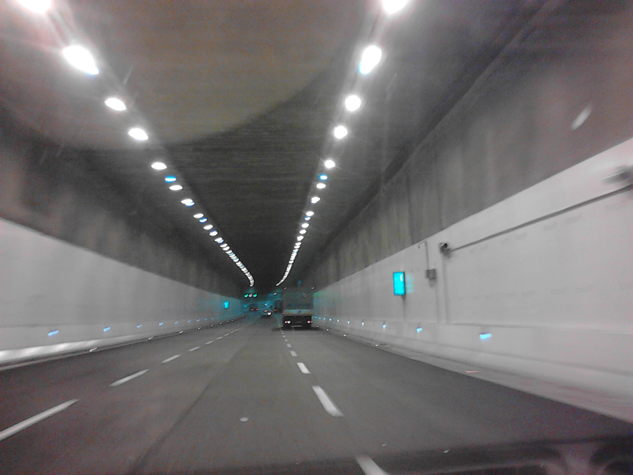 Monza, il tunnel di viale Lombardia.